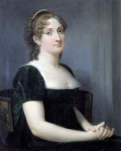 Ritratto della contessa Anna Maria Porro Lambertenghi Serbelloni, olio su tela, 74.5 x 60 cm, Galleria d'arte moderna, Milano